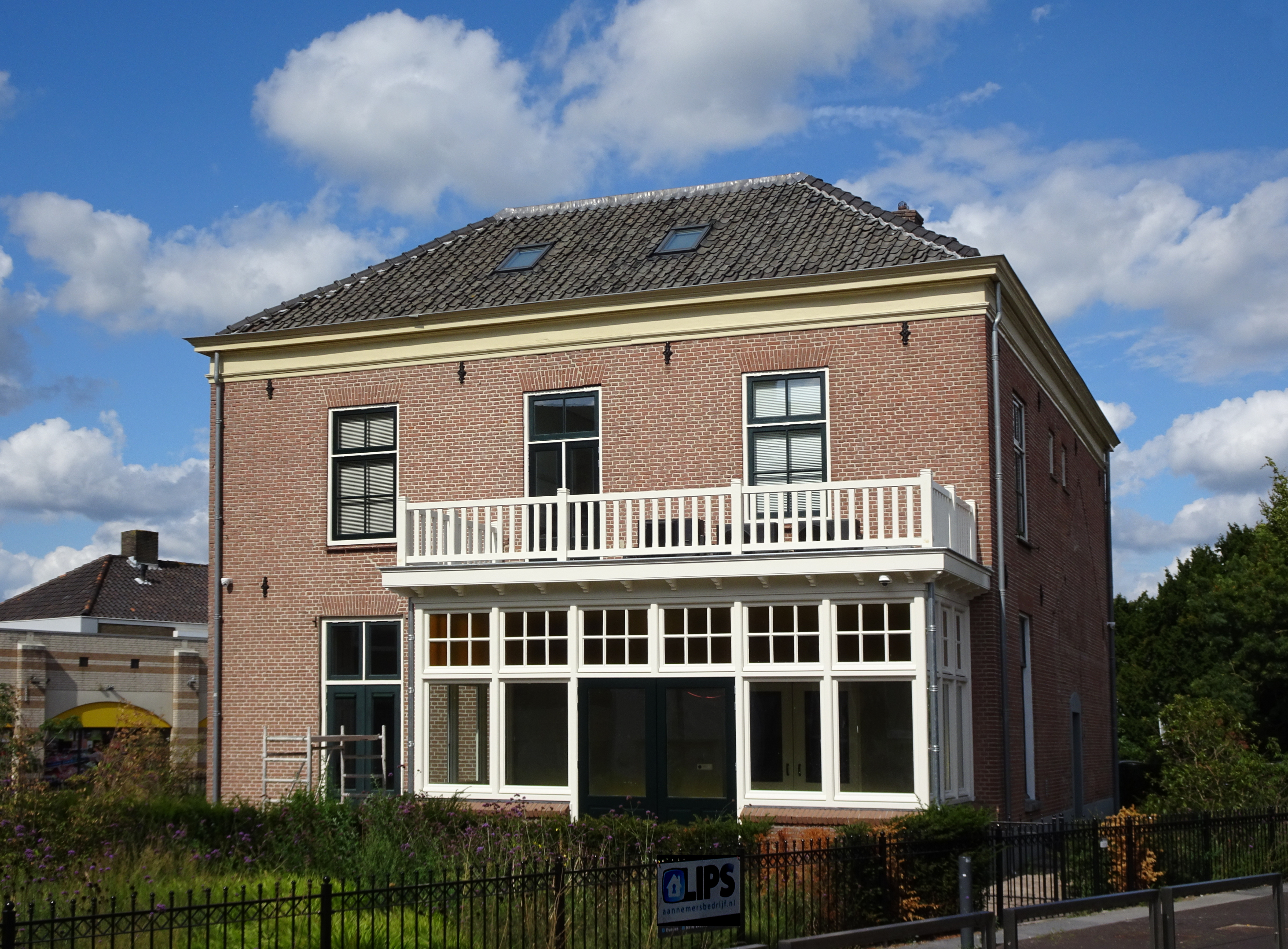 Duiven, Pastoriestraat 1. Achterzijde voormalige pastorie van de Remigiuskerk, met serre en balkon, 1866